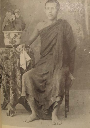 สามเณรปู่ขุ่น1